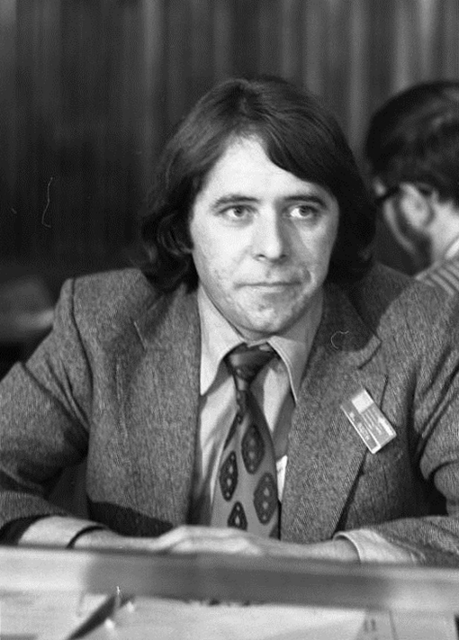 Bundesparteitag der SPD in Hannover (Wolfgang Roth) 10.-14.4.1973